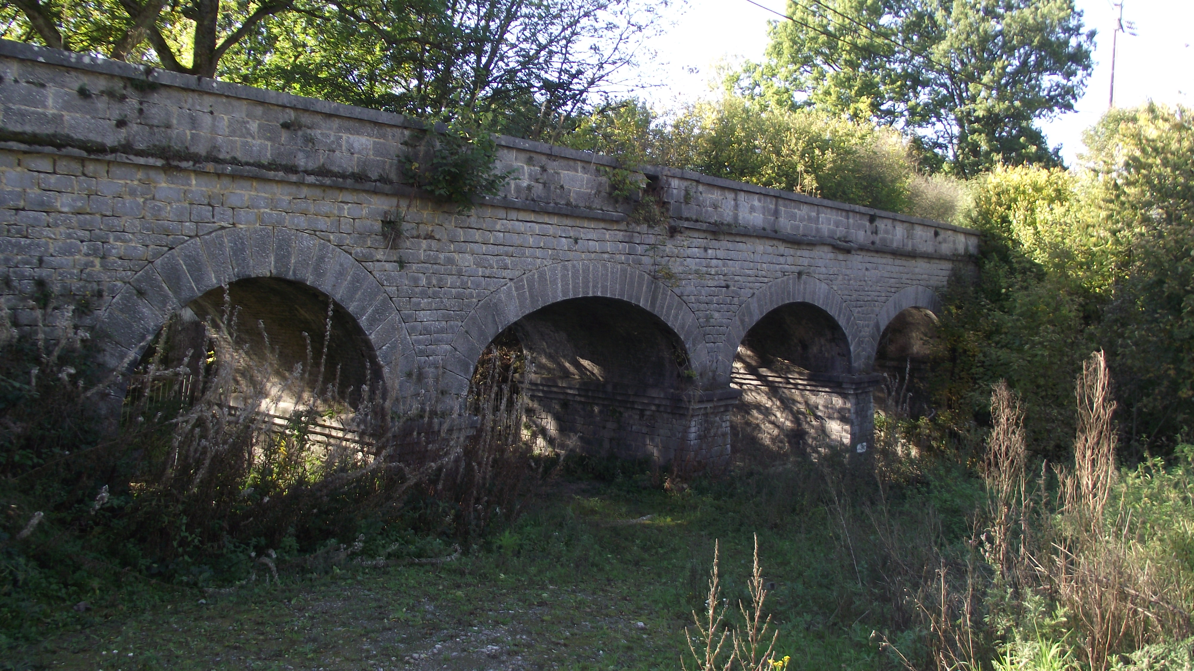 Buurtspoorwegbrug in Rièzes over de Eau Noire rivier